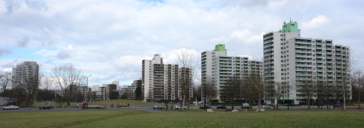 Bremen-Osterholz: Blick von der Otto-Brenner-Allee auf die Neuwieder Str. (alle Häuser linksseitig der Neuwieder Str. wurden im Rahmen einer Sanierung ab 2004 abgerissen)